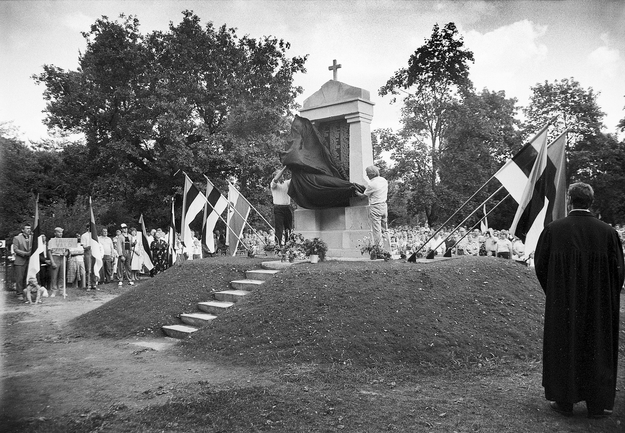 Mälestussamba taasavamine Kosel 17. juunil 1989